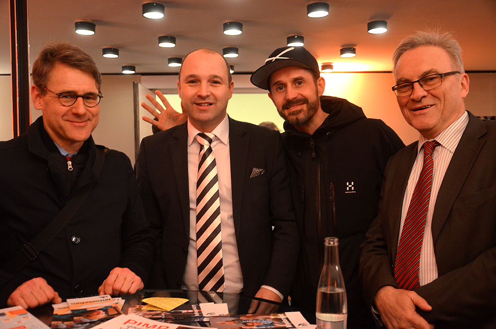 Aufnahme während des Neujahrsempfangs der Landeshauptstadt Hannover am 9. Januar 2017 im Neuen Rathaus ... von links: Oliver Kucklinski vom Bürgerbüro Stadtentwicklung Hannover, Matthias Görn (Vorstand vom Niedersächsisches Landesmuseum Hannover sowie Vorstand vom Freundeskreis Hannover), Rapper Spax sowie ein Gast.